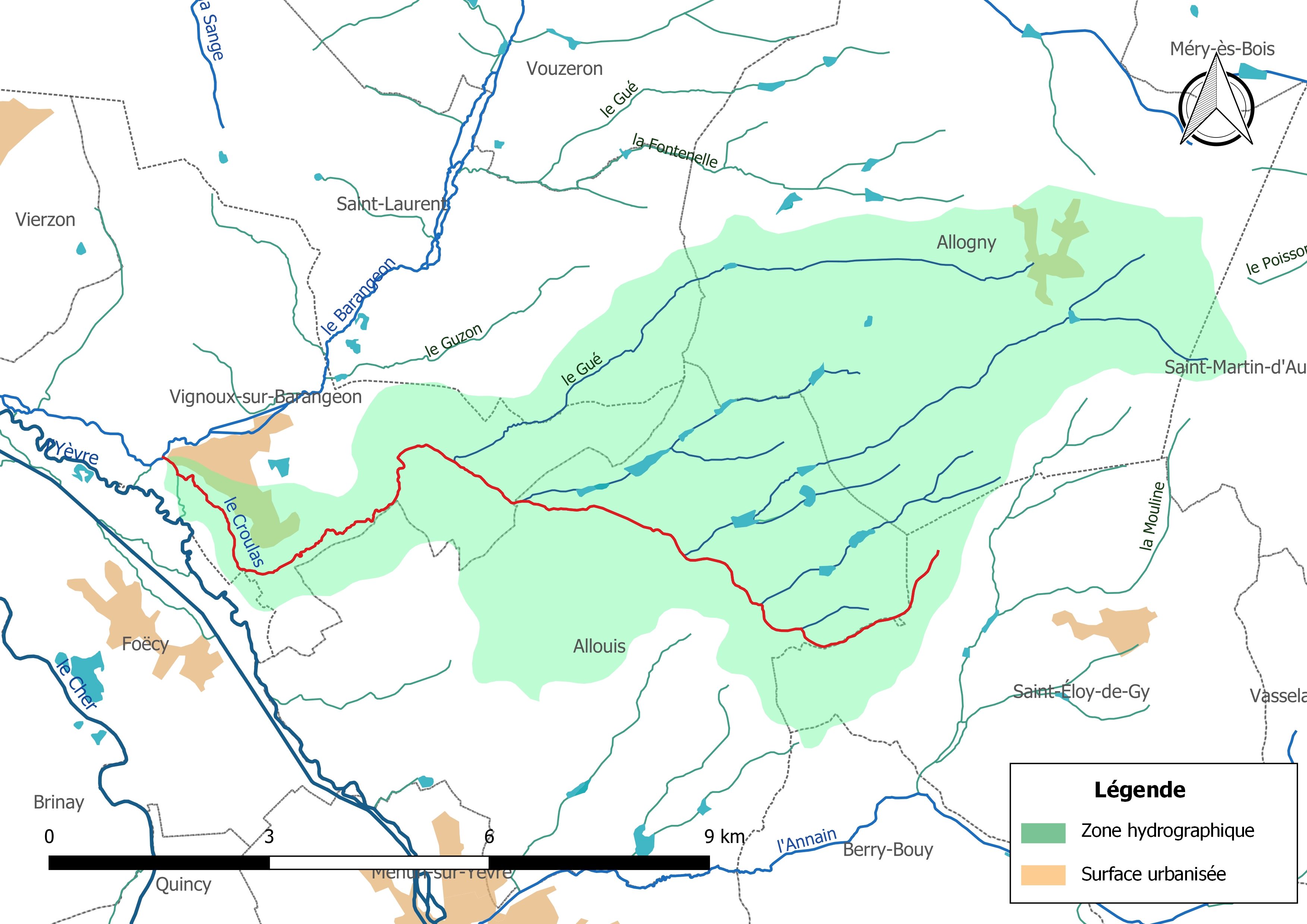 Carte du cours d'eau « le Croulas » (France) et de la zone hydrographique dans laquelle il s'insère.